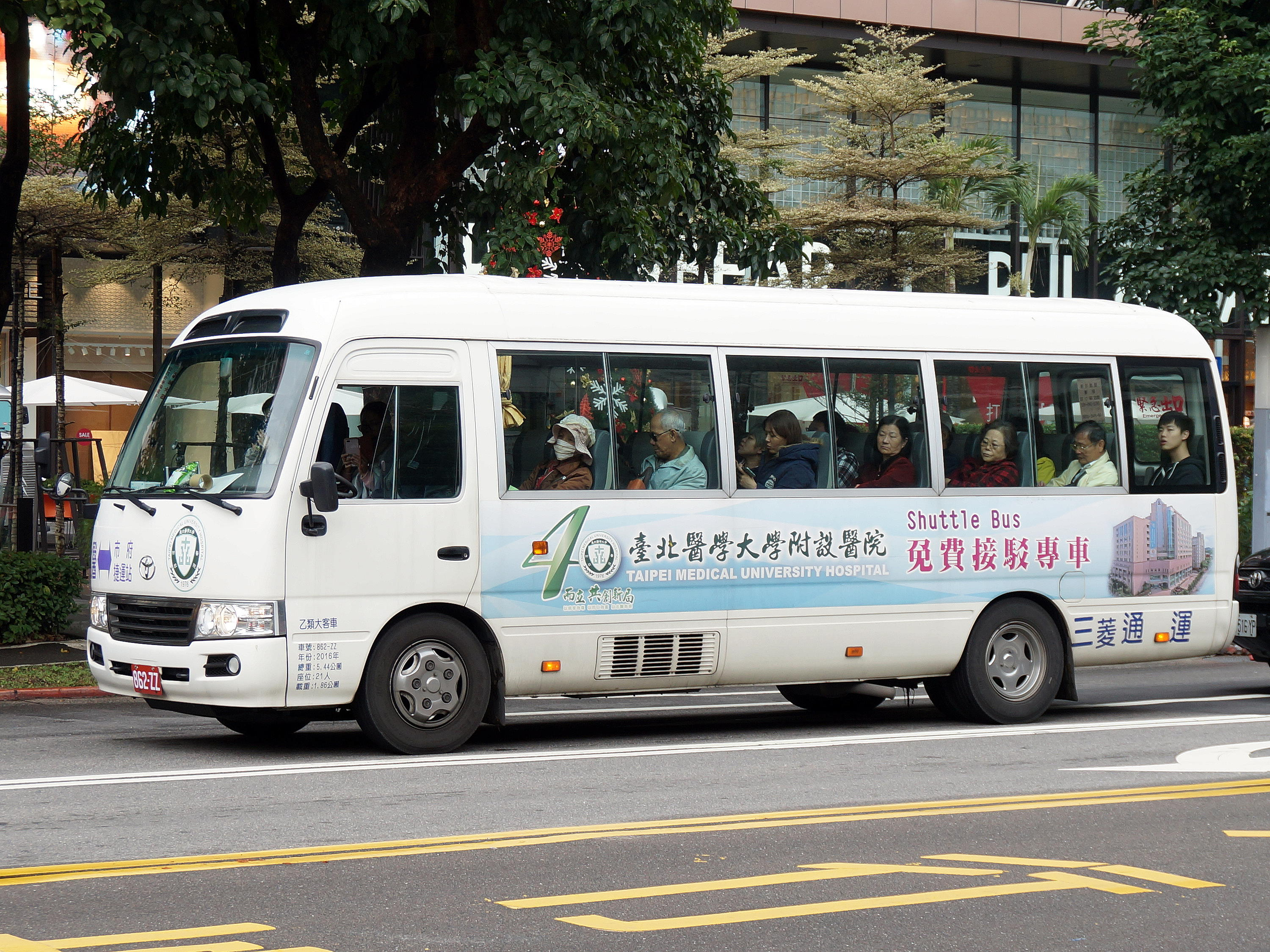 三菱通運2016年豐田Coaster中型巴士862-ZZ，行駛臺北醫學大學附設醫院免費接駁專車。